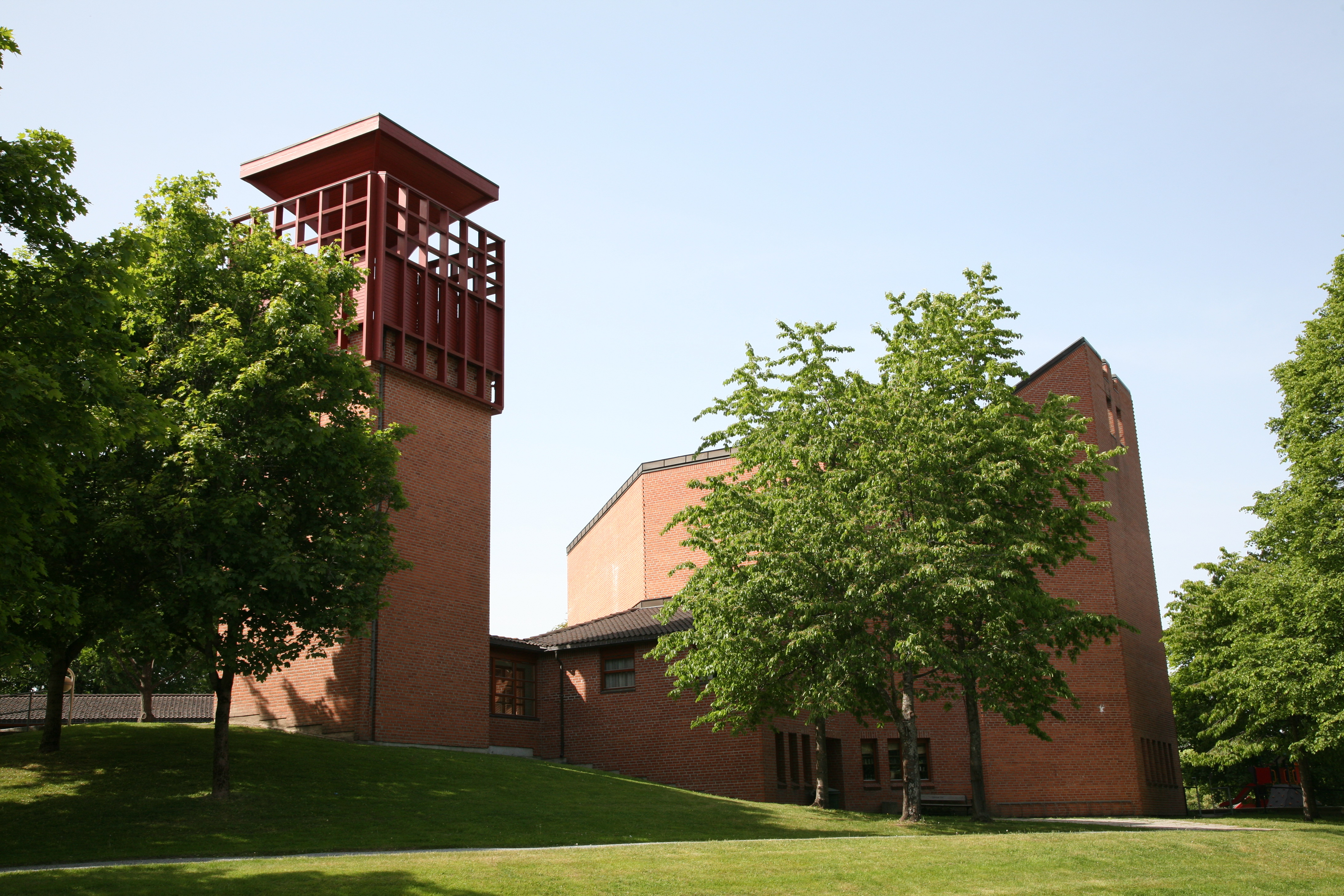 Helgerud church in Bærum, Norway